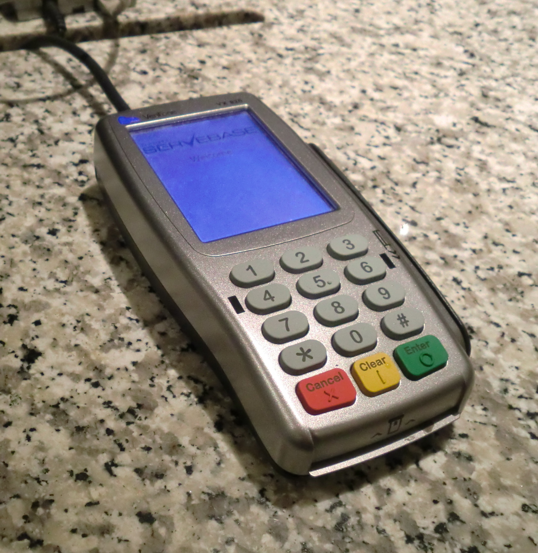 VeriFone のクレジットカード読み取り機